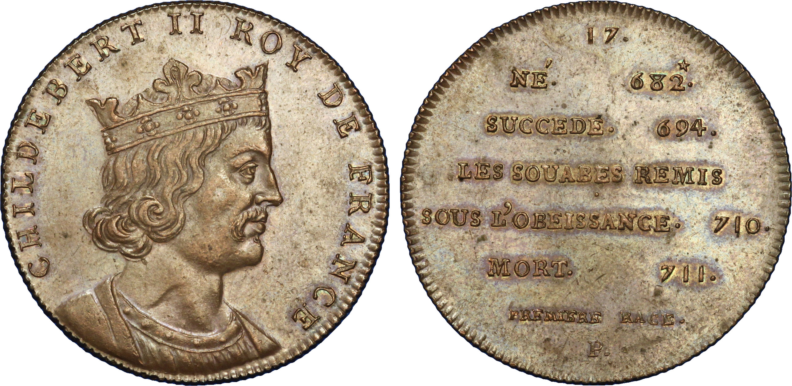 Métal : cuivre rouge Diamètre : 32mm Axe des coins : 12h. Poids : 12,09g. Tranche : cannelée Degré de rareté : R1 Titulature avers : CHILDEBERT II ROY DE FRANCE. Description avers : Buste imaginaire drapé et couronné à droite. Titulature revers : 17- NÉ 682* - SUCCEDE 694 - LES SOUABES REMIS SOUS L’OBEISSANCE 710 - MORT 711 - PREMIERE RACE / P.. Description revers : en huit lignes.